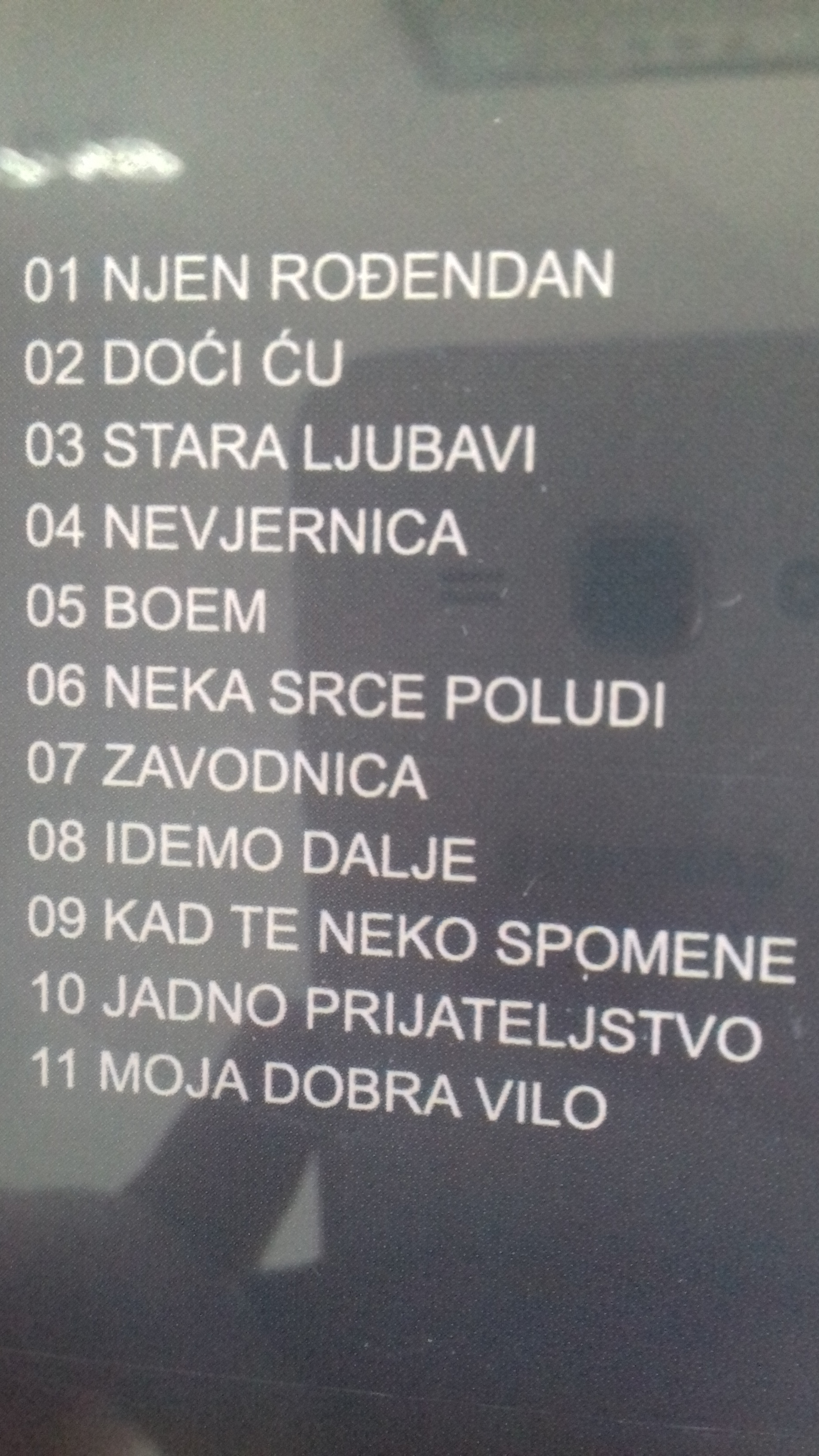 Фотографија задње стране оригиналног албума, мислим боља листа пјесама за чланак Idemo dalje (album Koketa)